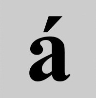 լատինական a տառը դիակրիտիկ նշանով